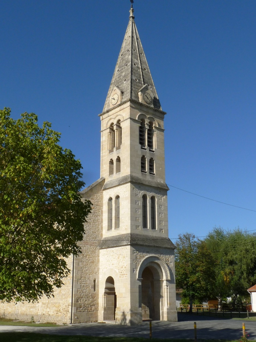 clocher-porche de l'église de Naujac-sur-Mer, Gironde, France